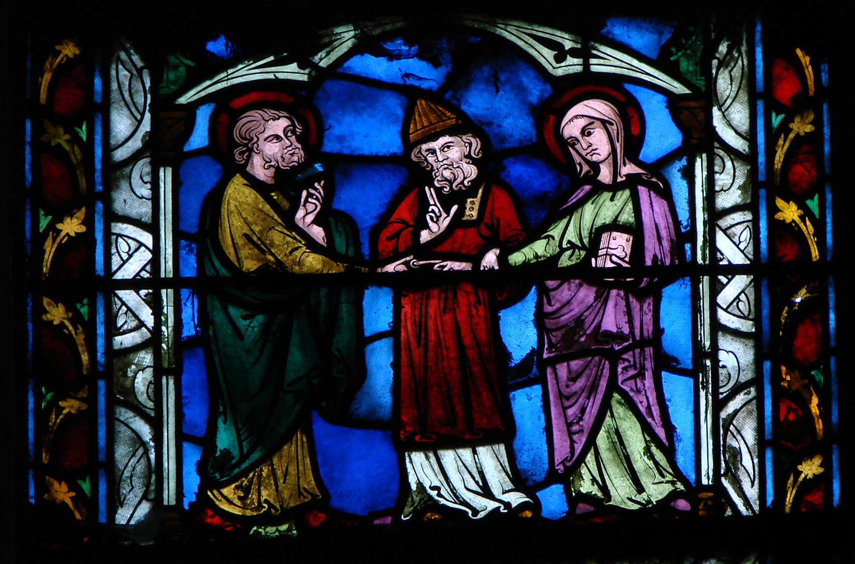 Vitrail de la basilique Saint-Urbain, à Troyes: le mariage de la Vierge. Ce vitrail date de la fin du 19ème siècle; il a été fait dans l'esprit des vitraux originaux, fin 13ème siècle, de la basilique.